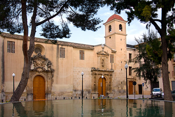 Iglesia/Convento del Carmen. Orihuela